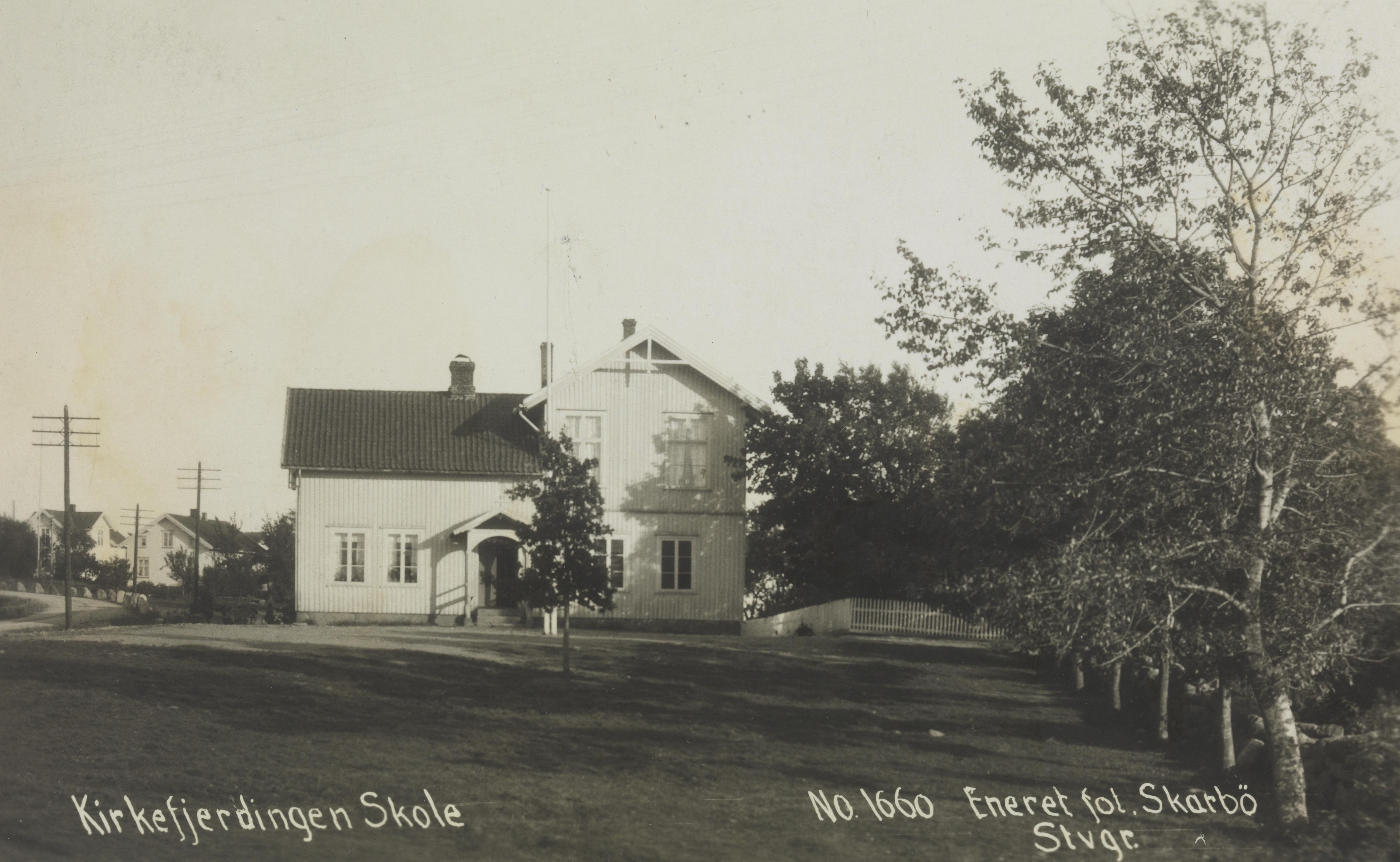 Bildet er hentet fra Nasjonalbibliotekets bildesamling Tjølling, Larvik, Vestfold